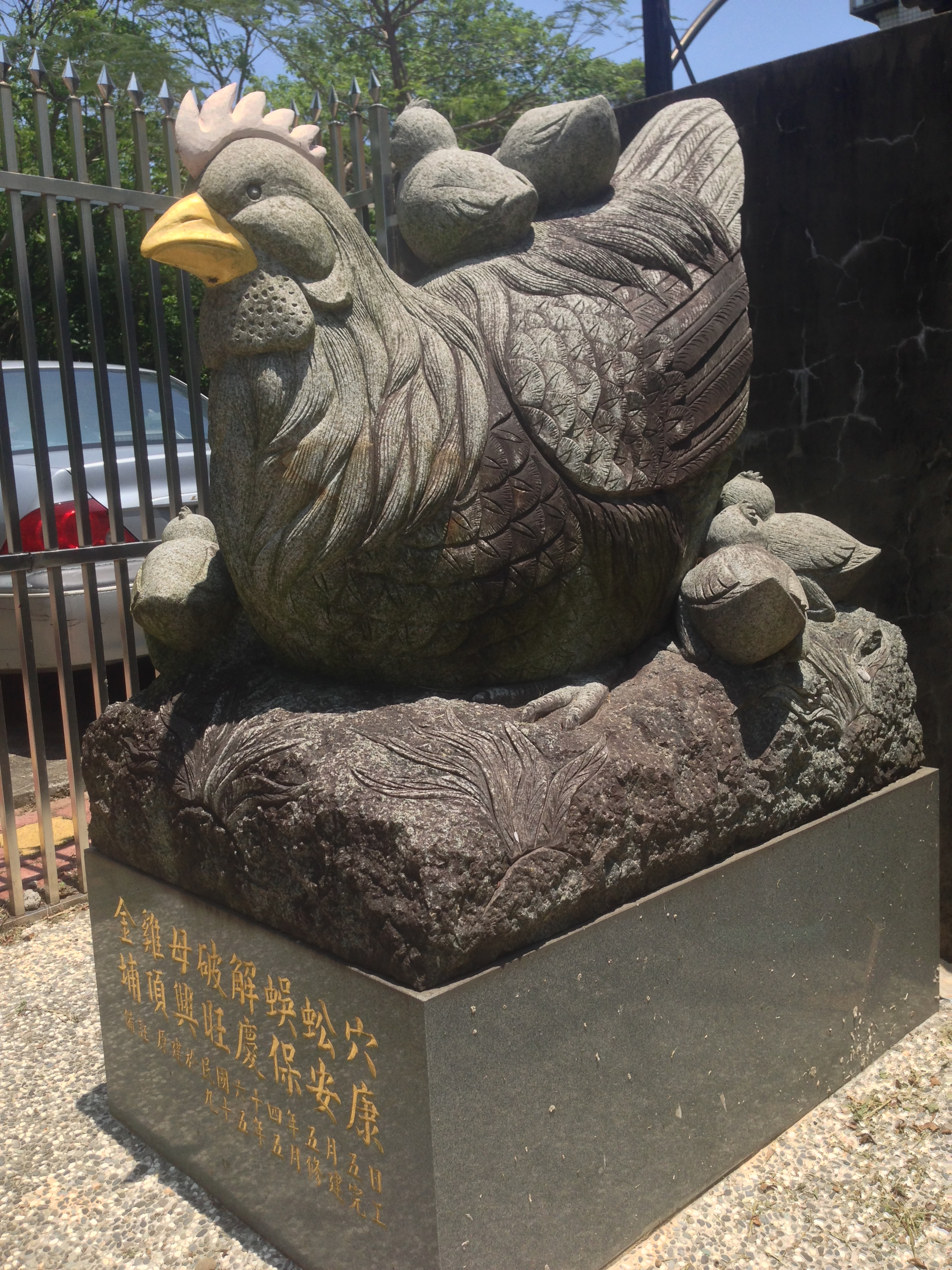 中文（台灣）: 埔頂金雞母近照